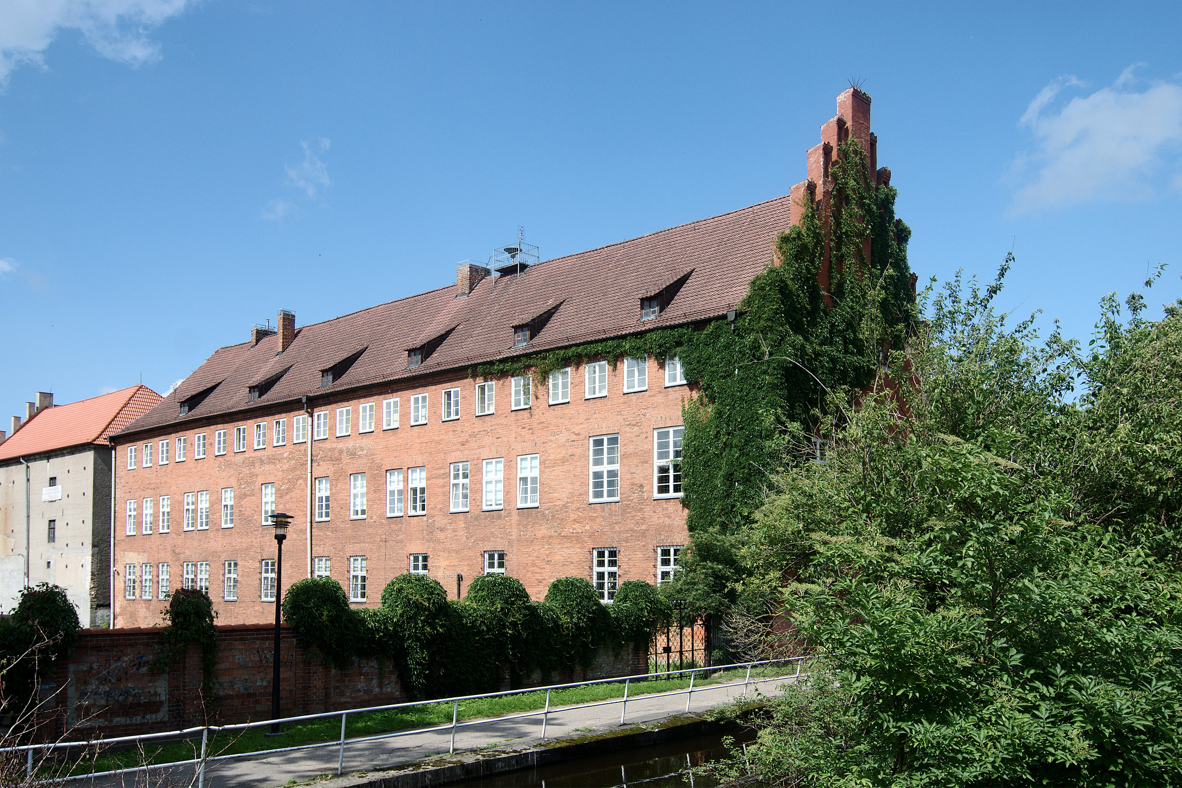 Lębork. Dawny zamek krzyżacki, obecnie siedziba sądu.